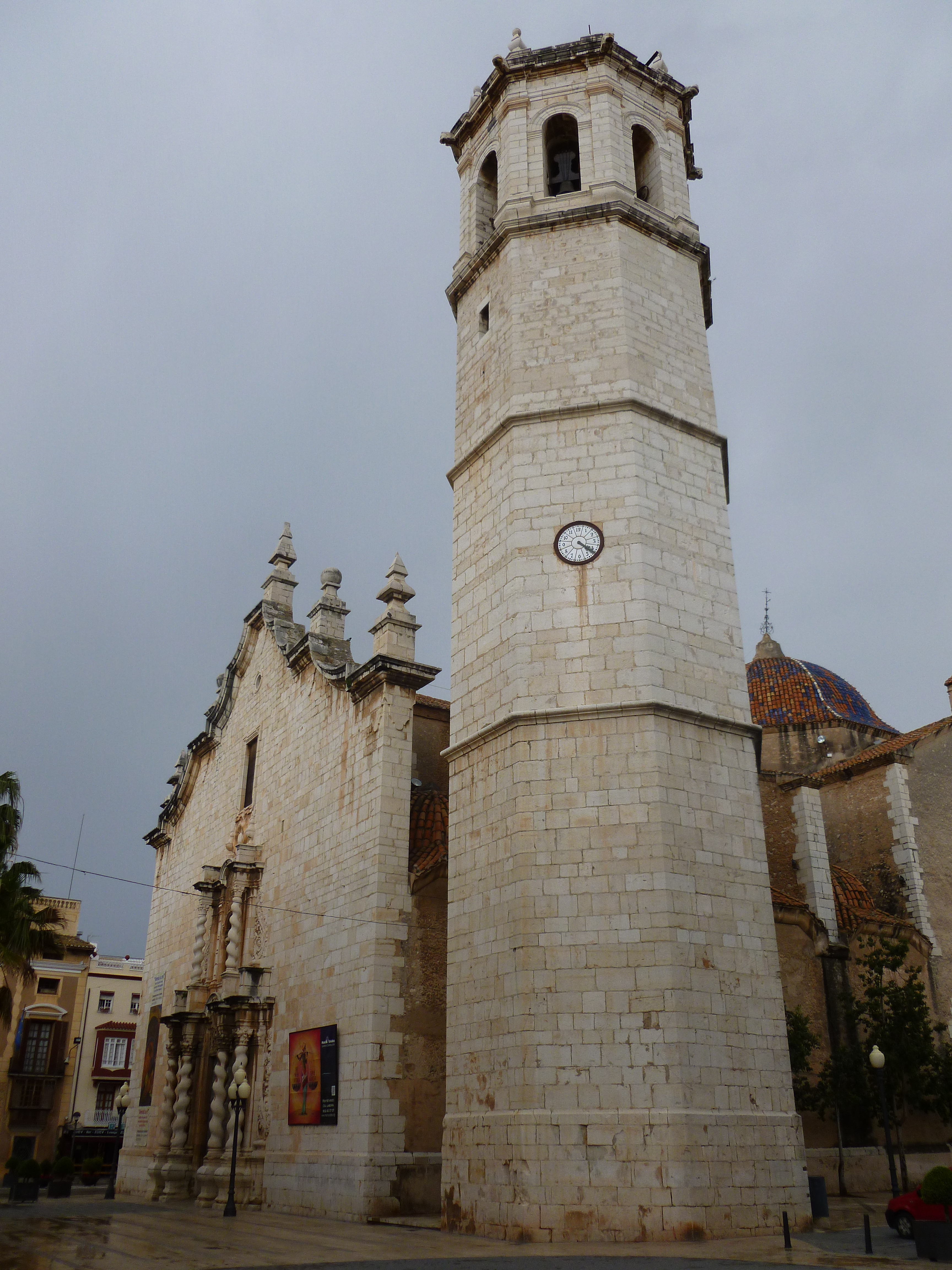 Església de Sant Bertomeu, Benicarló 03.027-003.